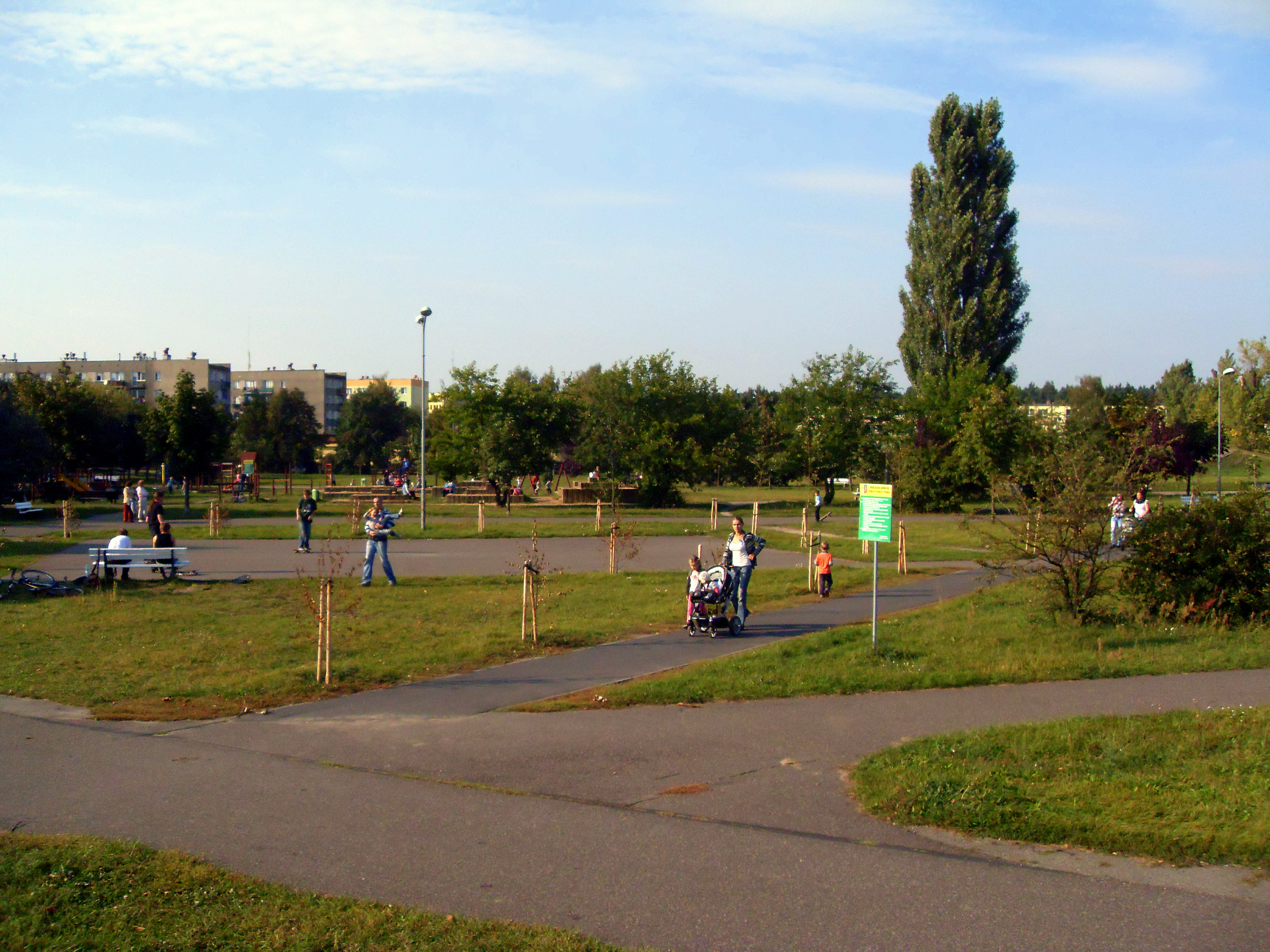 Park 600-lecia w Wągrowcu.